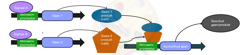 Loogikavärav AND